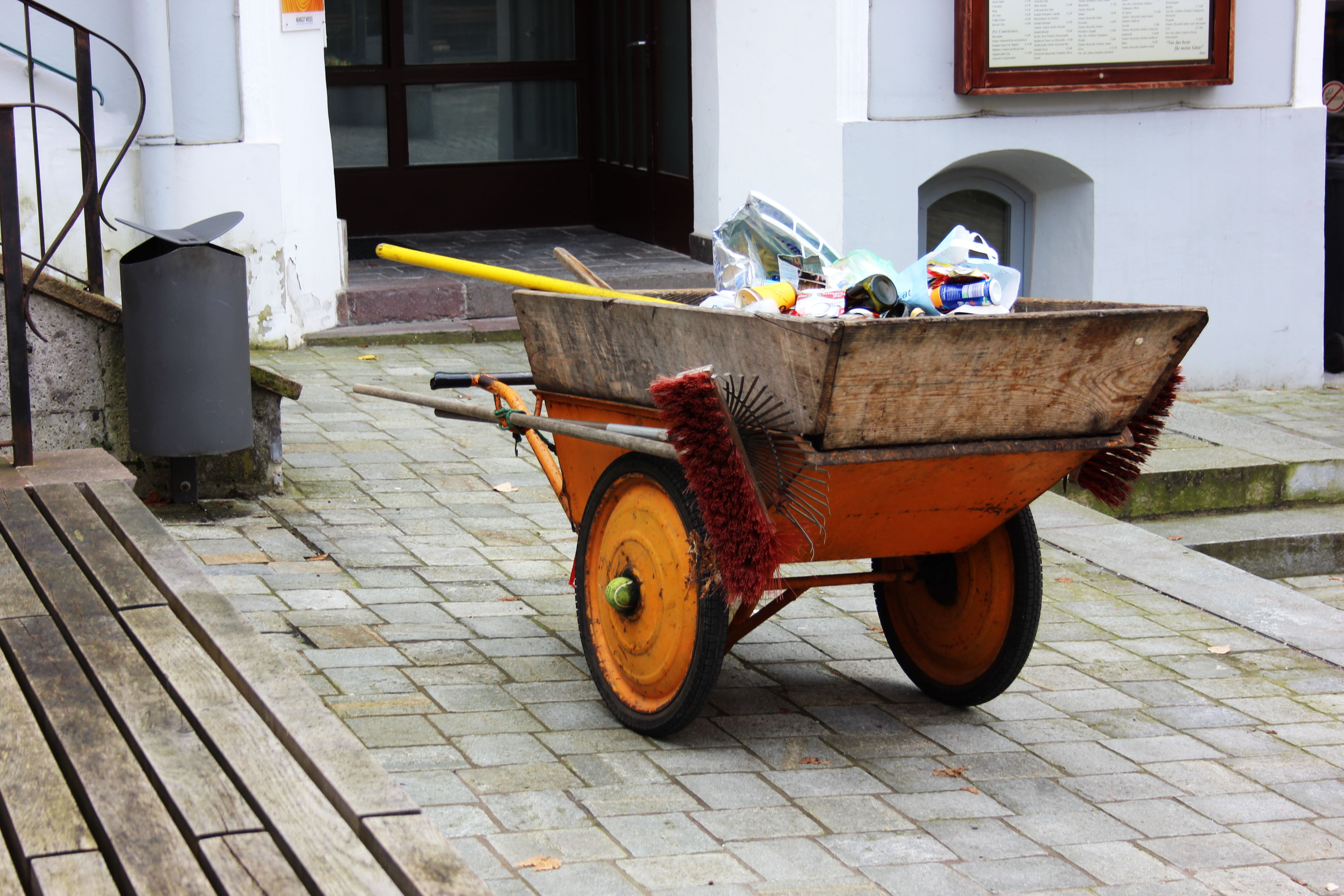 Handkarre; zweirädrige Schubkarre zur Müllsammlung der Stadtverwaltung Kitzbühl